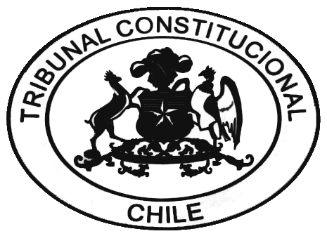 Escudo del Tribunal Constitucional de Chile